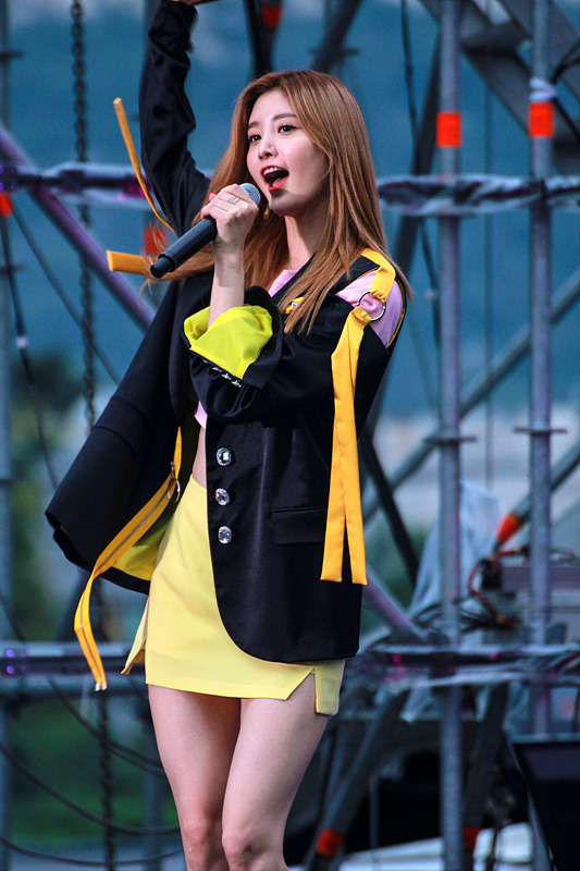 170819 도심속 봅슬레이